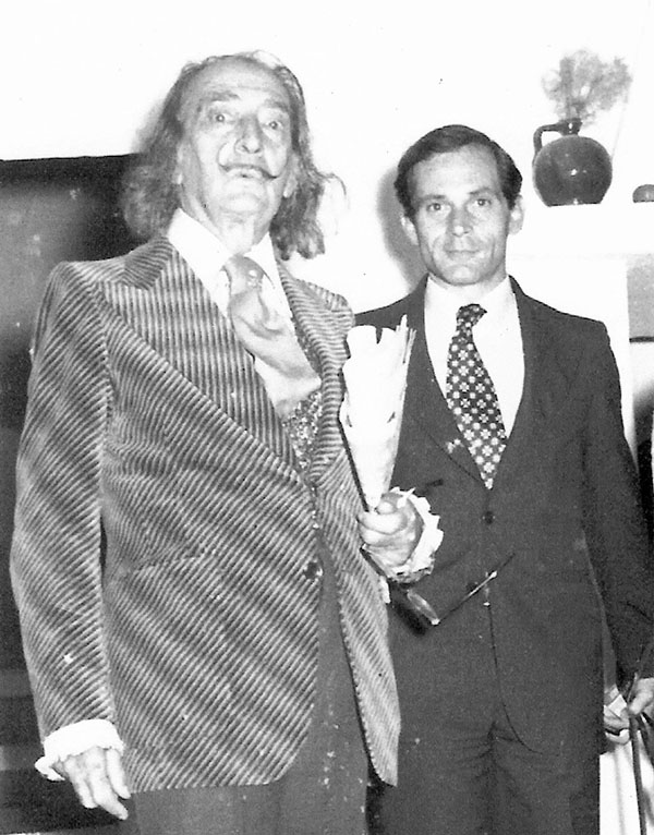 Dalí con Juan Quiros